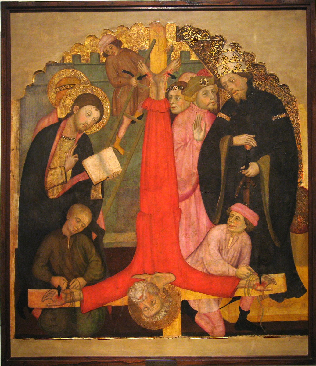 Crucifixió de Sant Pere. Pintura gòtica de Pere Serra (1400)